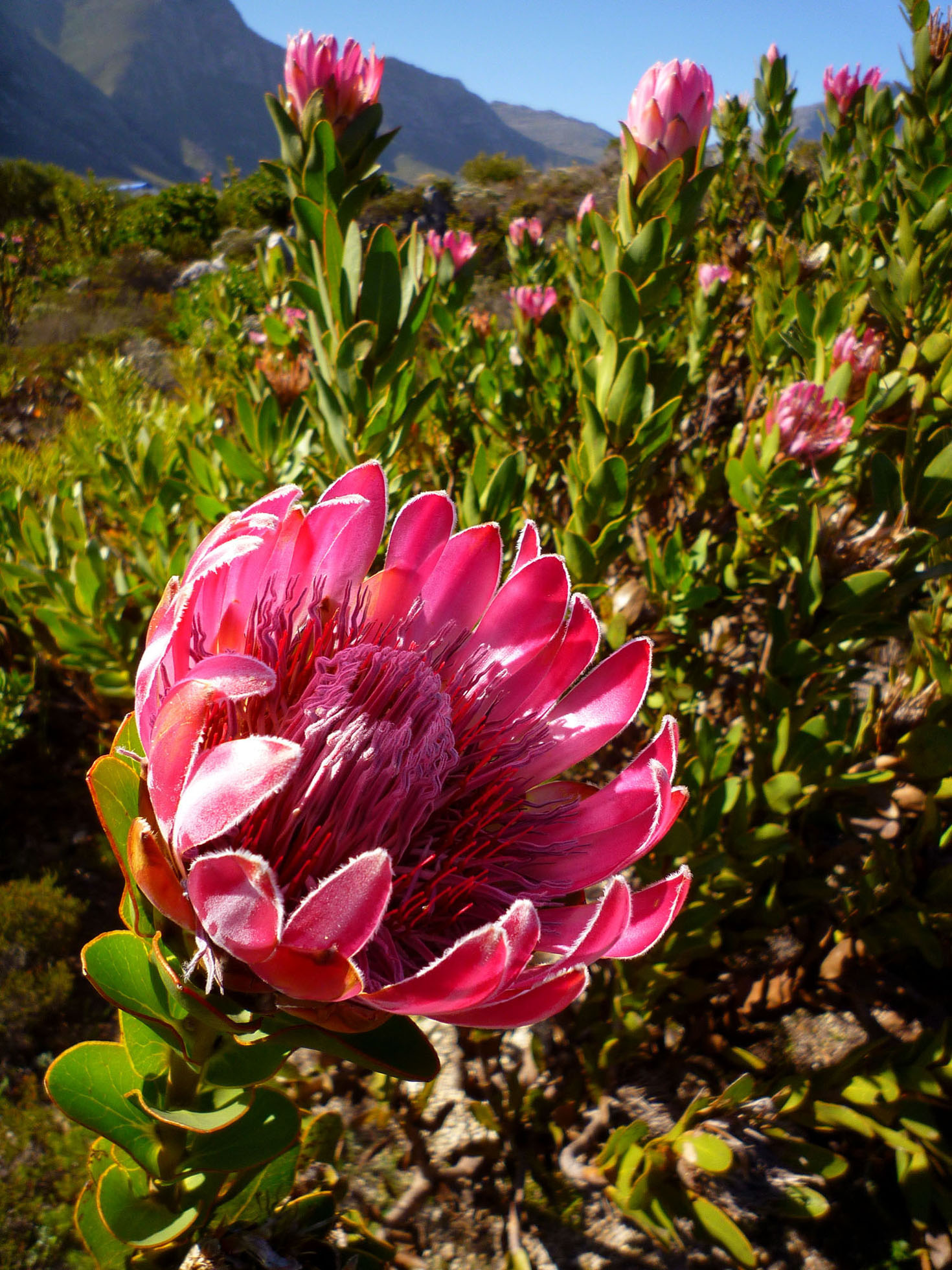 Protea compacta in Fernkloof Nature Reserve (Hermanus, South Africa).